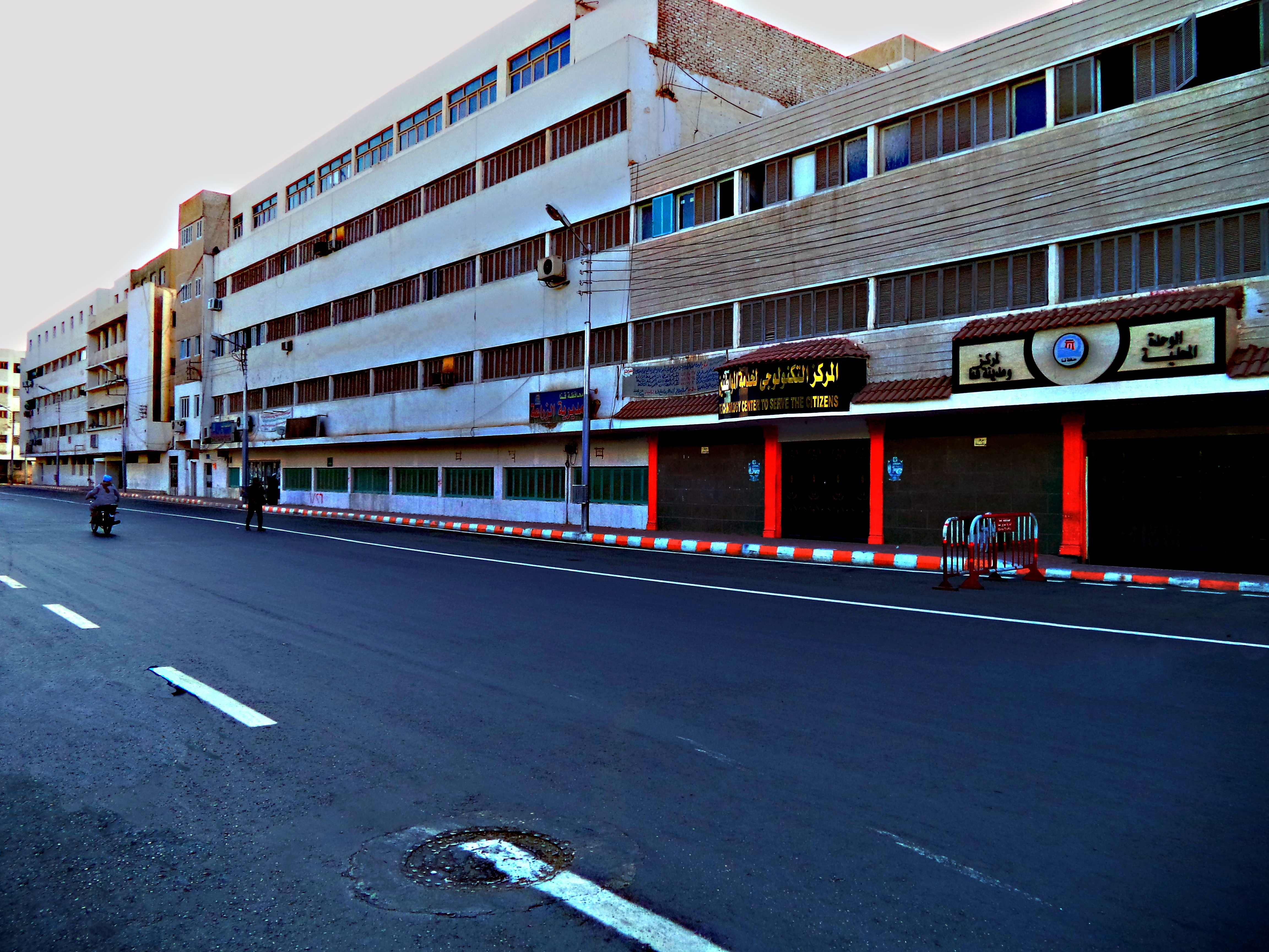 شارع الشهيد مجدي الدسوقي محافظة قنا جمهورية مصر العربية copyright Ahmed Abd Elghafar